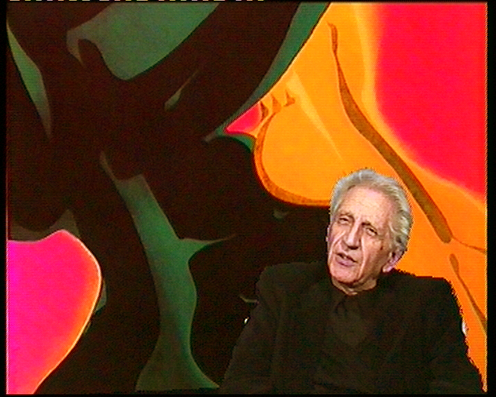 Portrait de Xavier Longobardi